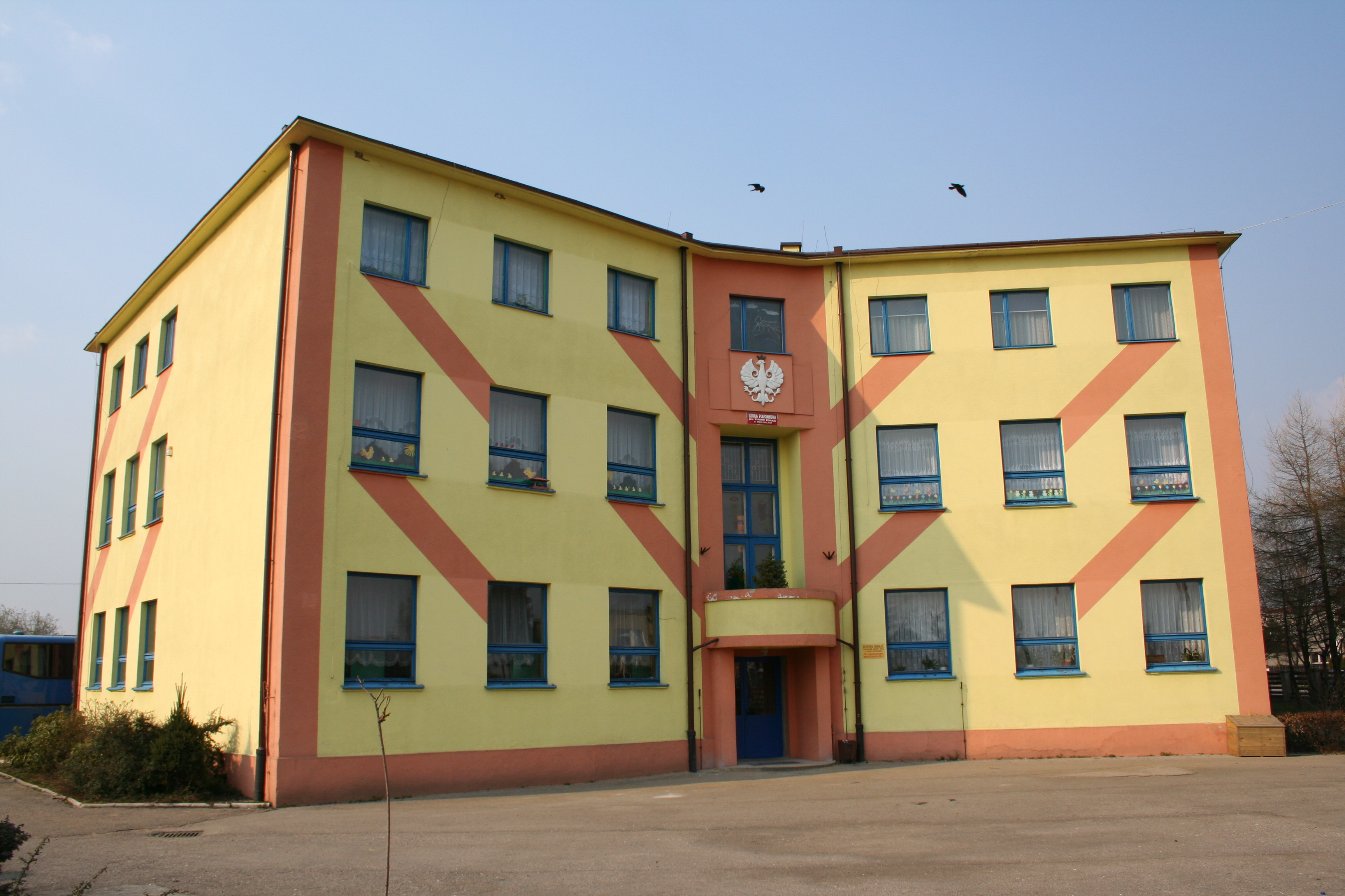 Zespół Szkół w Węglowicach, gmina Wręczyca Wielka, powiat kłobucki, województwo śląskie